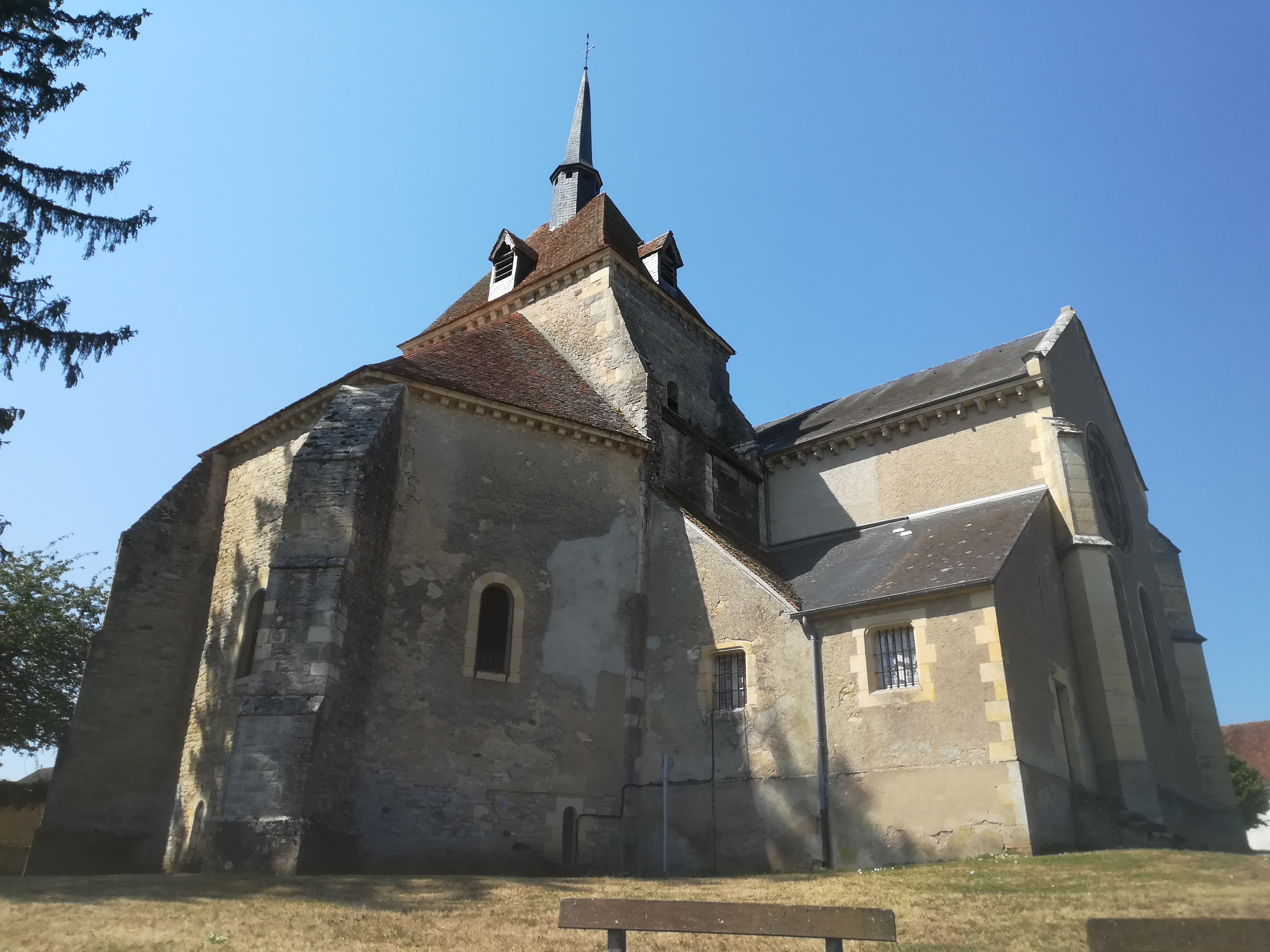 Photographie de l'église romane Saint-Patrice de Saint-Parize-le-Châtel, depuis le côté nord-est, de jour.